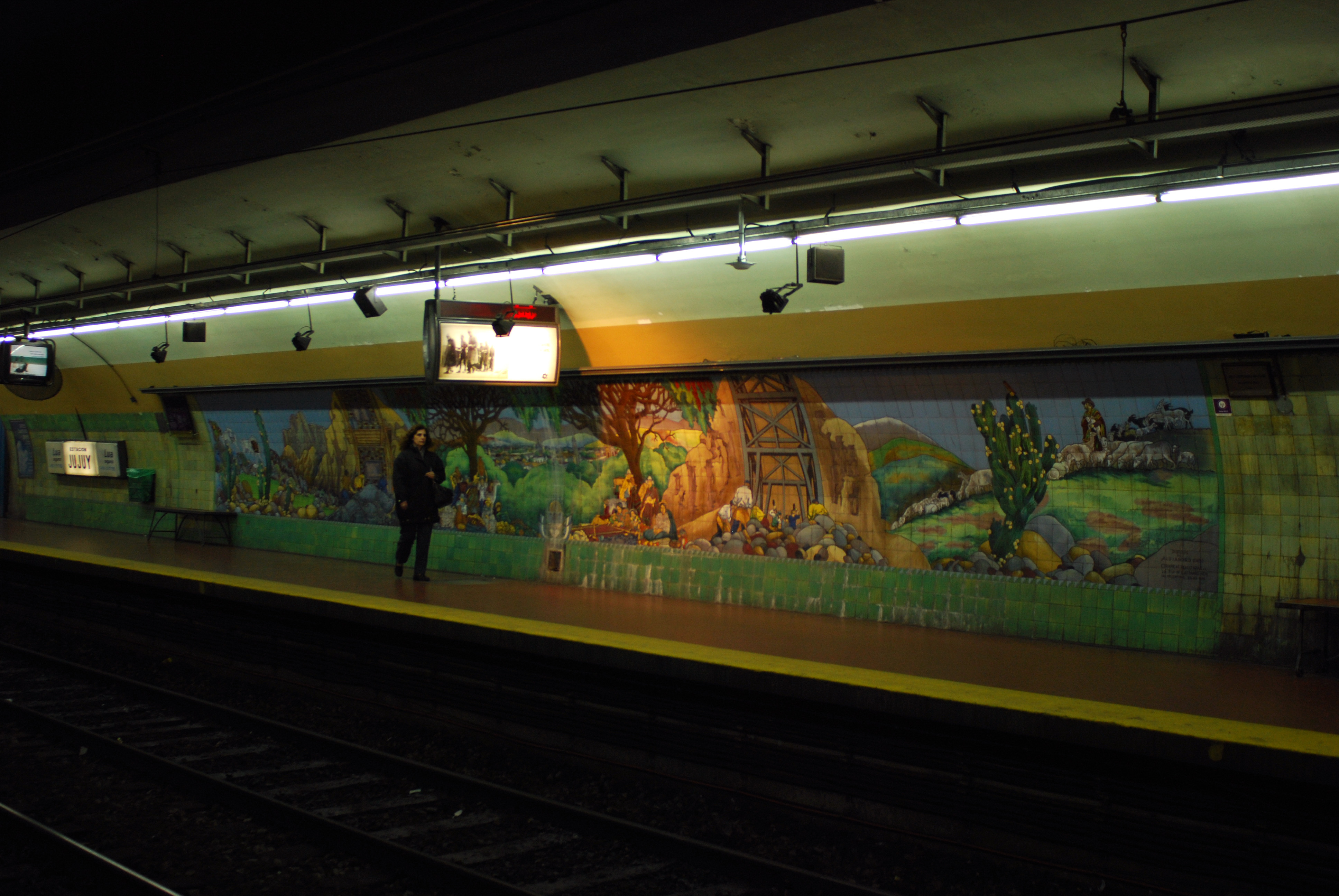 Mural en la estación Jujuy de la línea E de subtes en Buenos Aires, Argentina